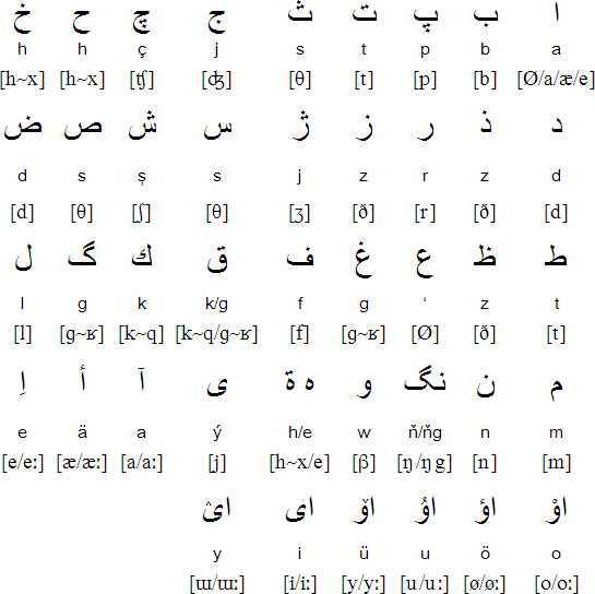 Арабский алфавит для туркменского языка